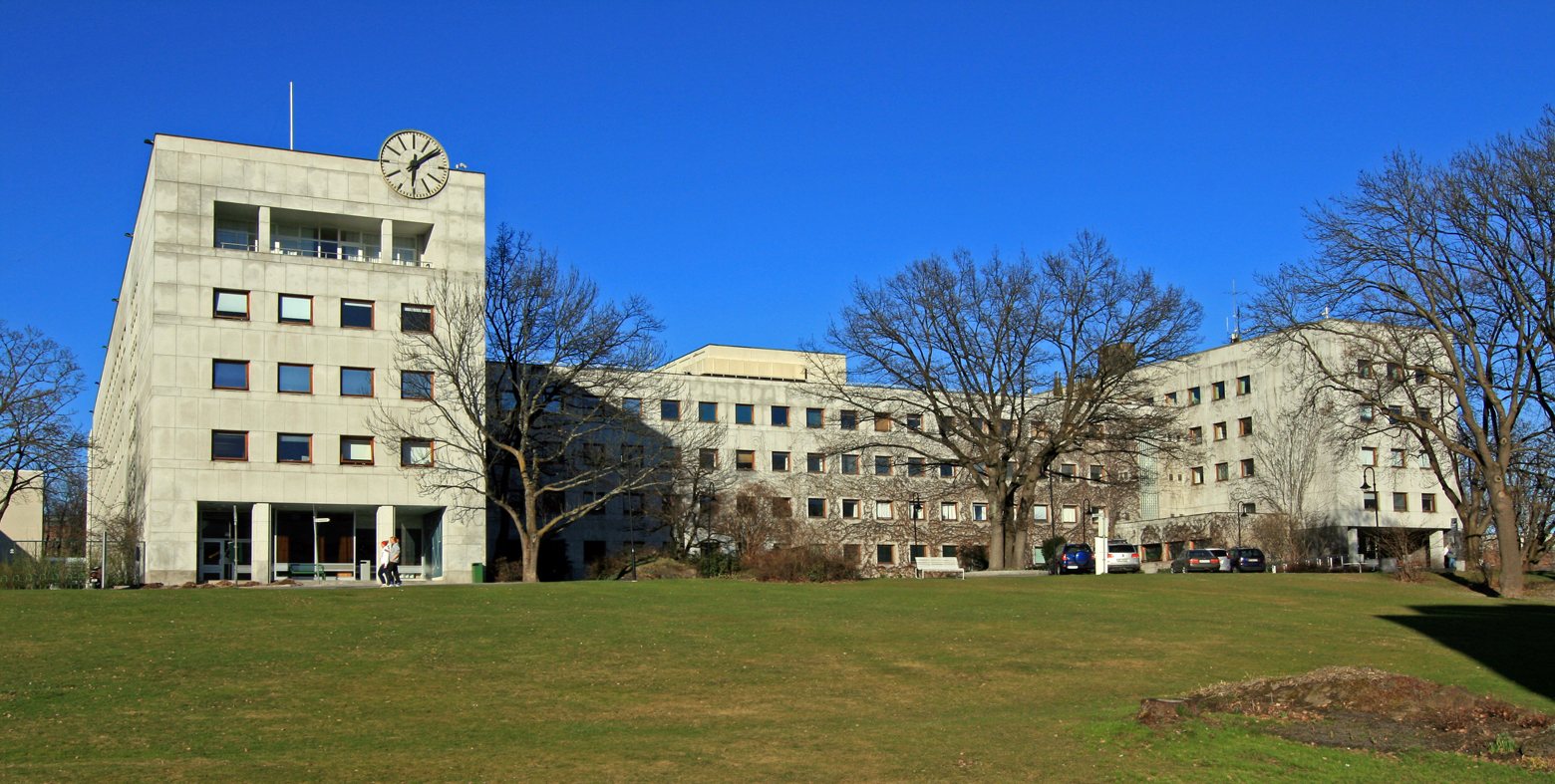 NRK Marienlyst - Radiohuset (Kringkastingshuset). Oppført 1938-45; arkitekt Nils Holter.